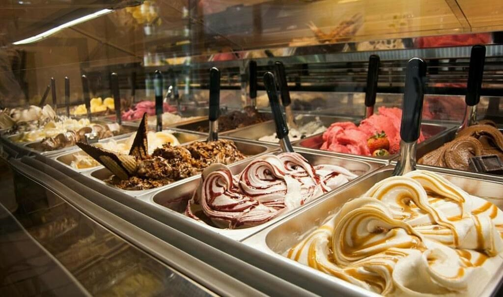 Heladería central de San José, fotografía tomada en la gira de turismo urbano, noviembre de 2016.